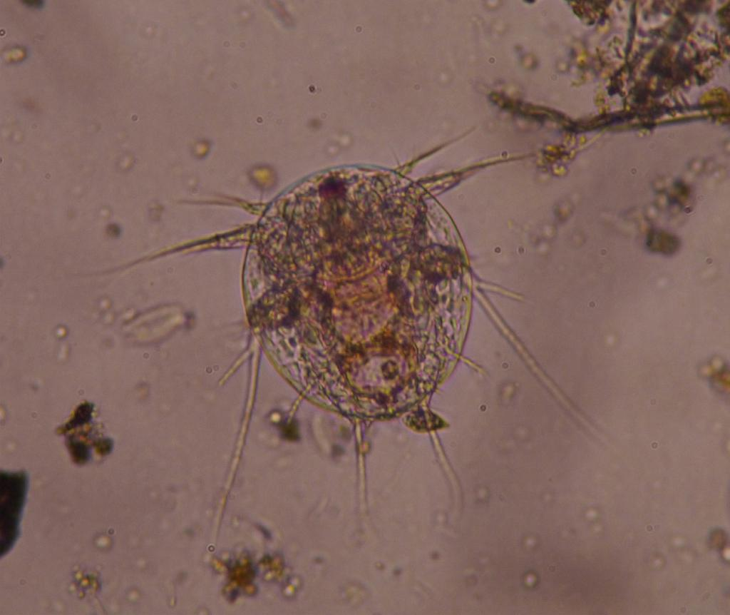 Tigriopus sp.(T. japonicus?)：ノープリウス 2015/06/13 和歌山県田辺市：Tanabe City. Wakayama Pref. Japan